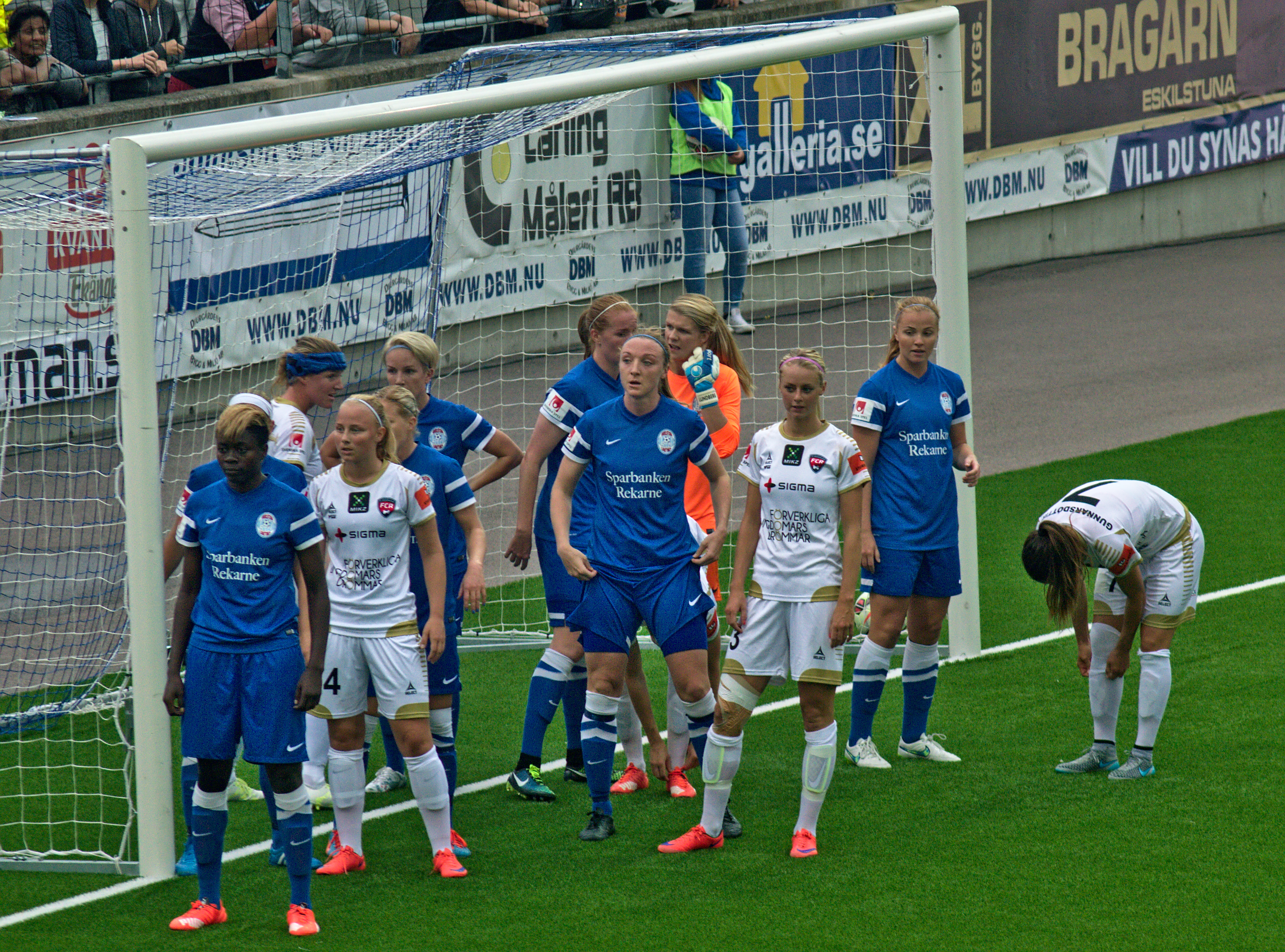 Eskilstuna United - FC Rosengård, Tunavallen i Eskilstuna 5 augusti 2015. Första halvlek.